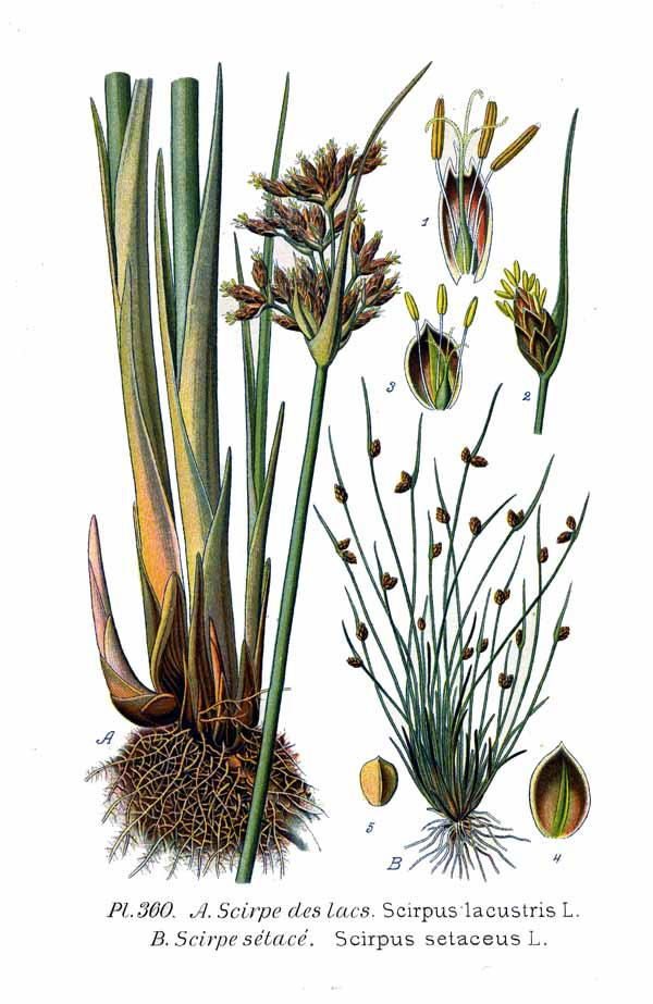 A. Schoenoplectus lacustris (L.) Palla, syn. Scirpus lacustris L. B. Scirpus setaceus L.